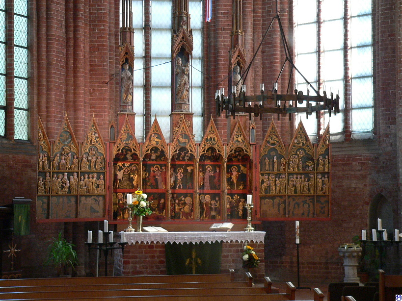 Altar 1320 im Kloster Cismar in Ostholstein